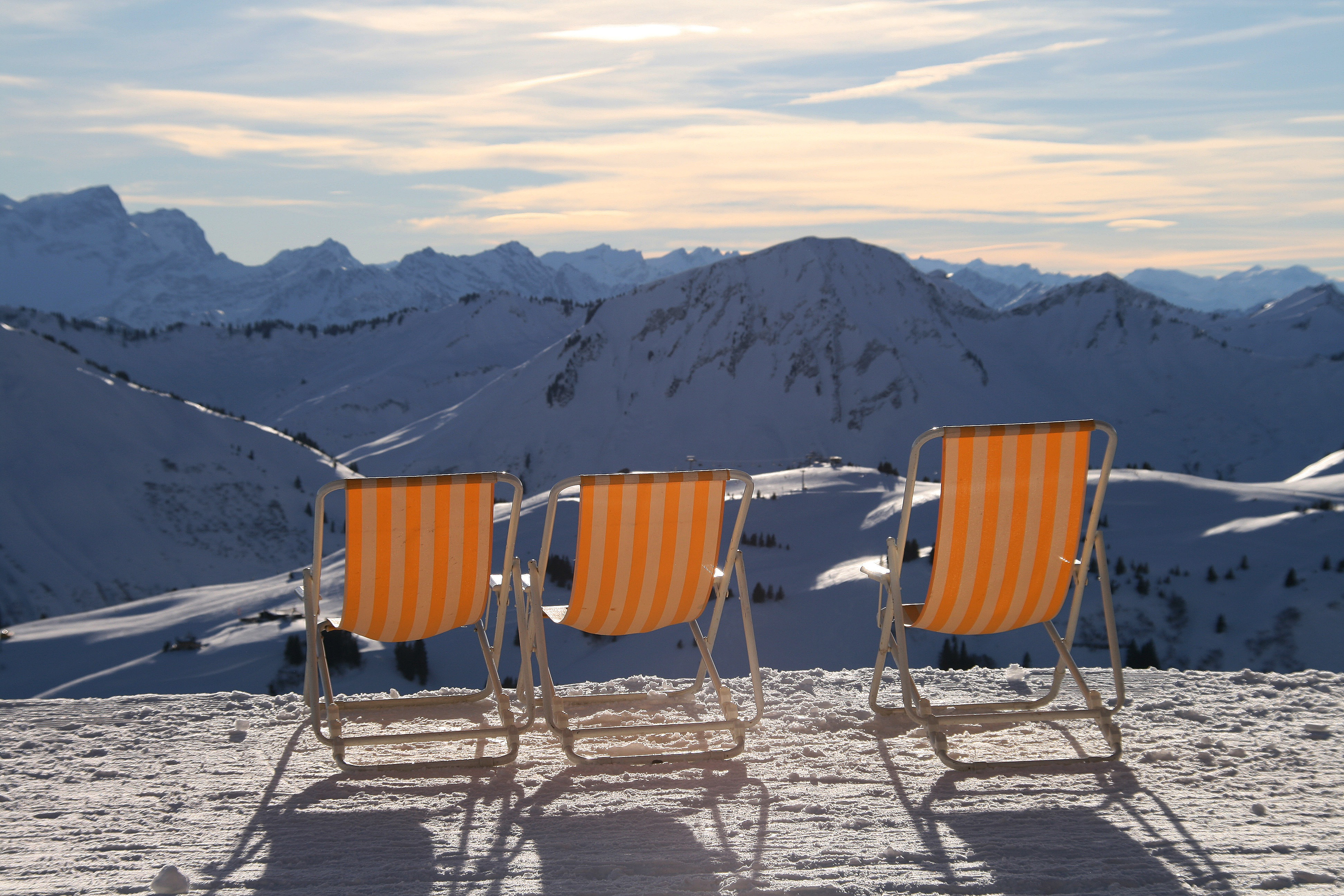 Liegestühle auf der Sonnenterrasse der Eisenalpstube in Damüls